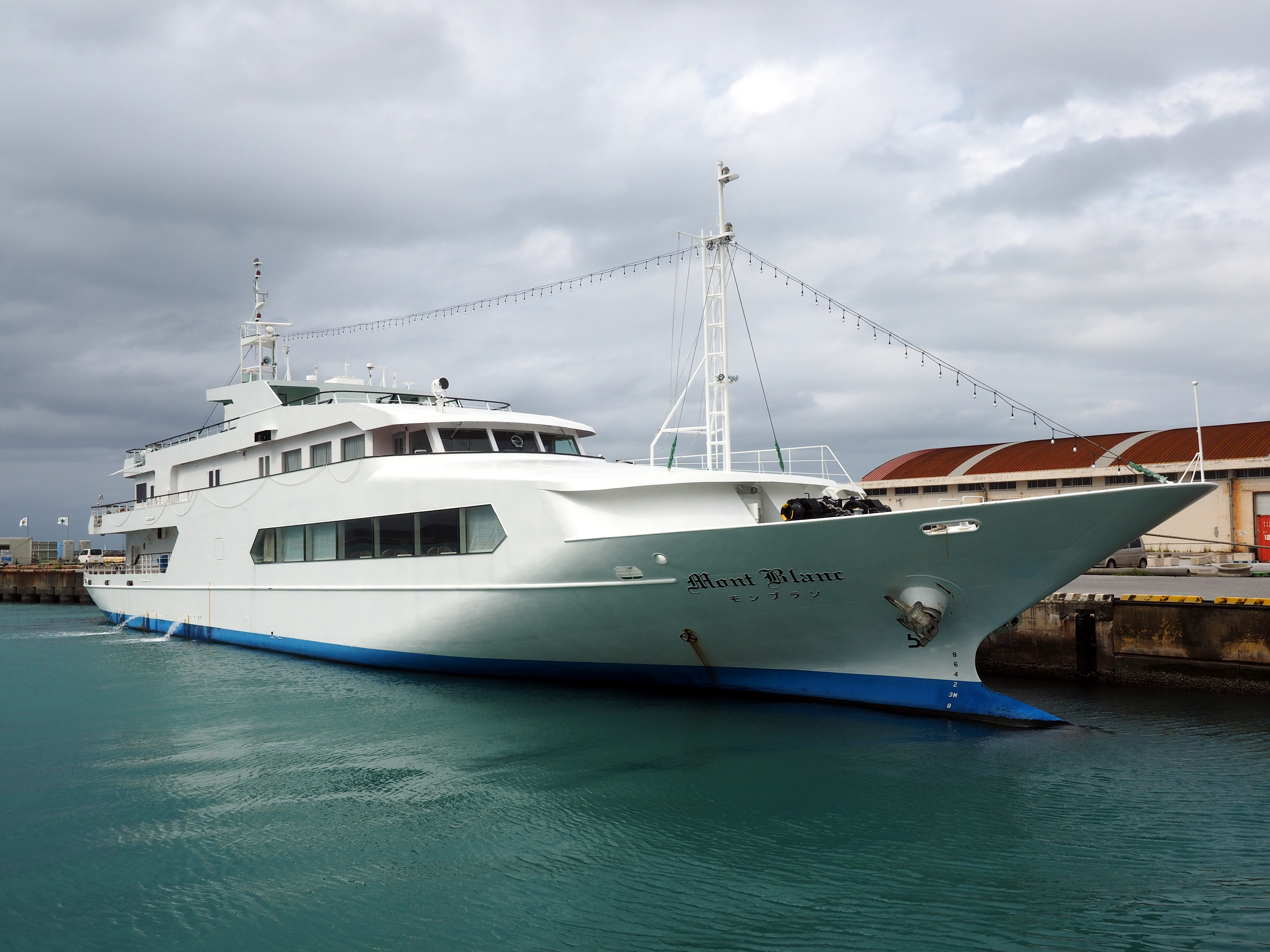 はやて（海運会社）のモンブラン（沖縄県宮古島市平良港）